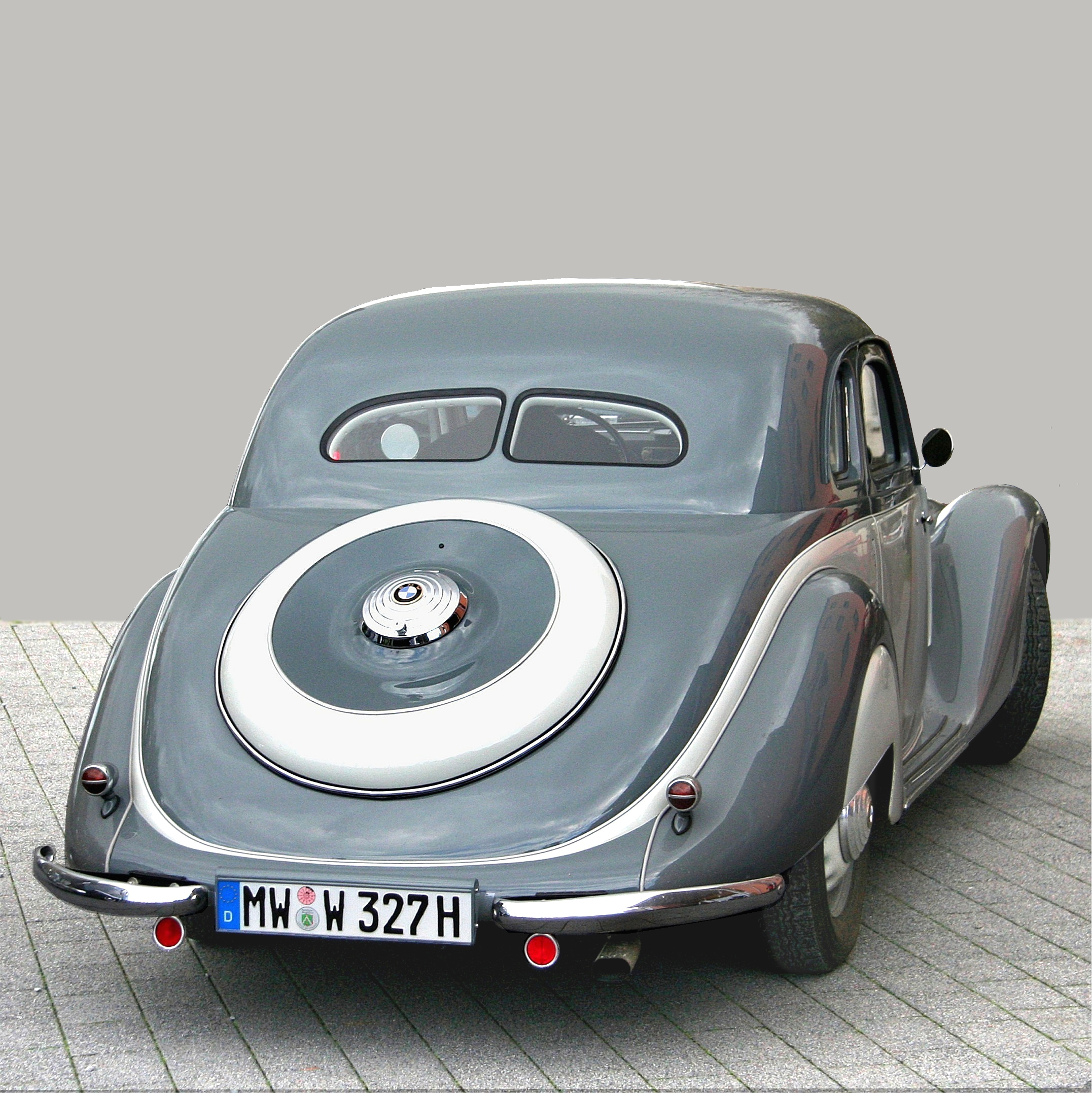 BMW 327, Baujahr 1940 (Phantasiekennzeichen)